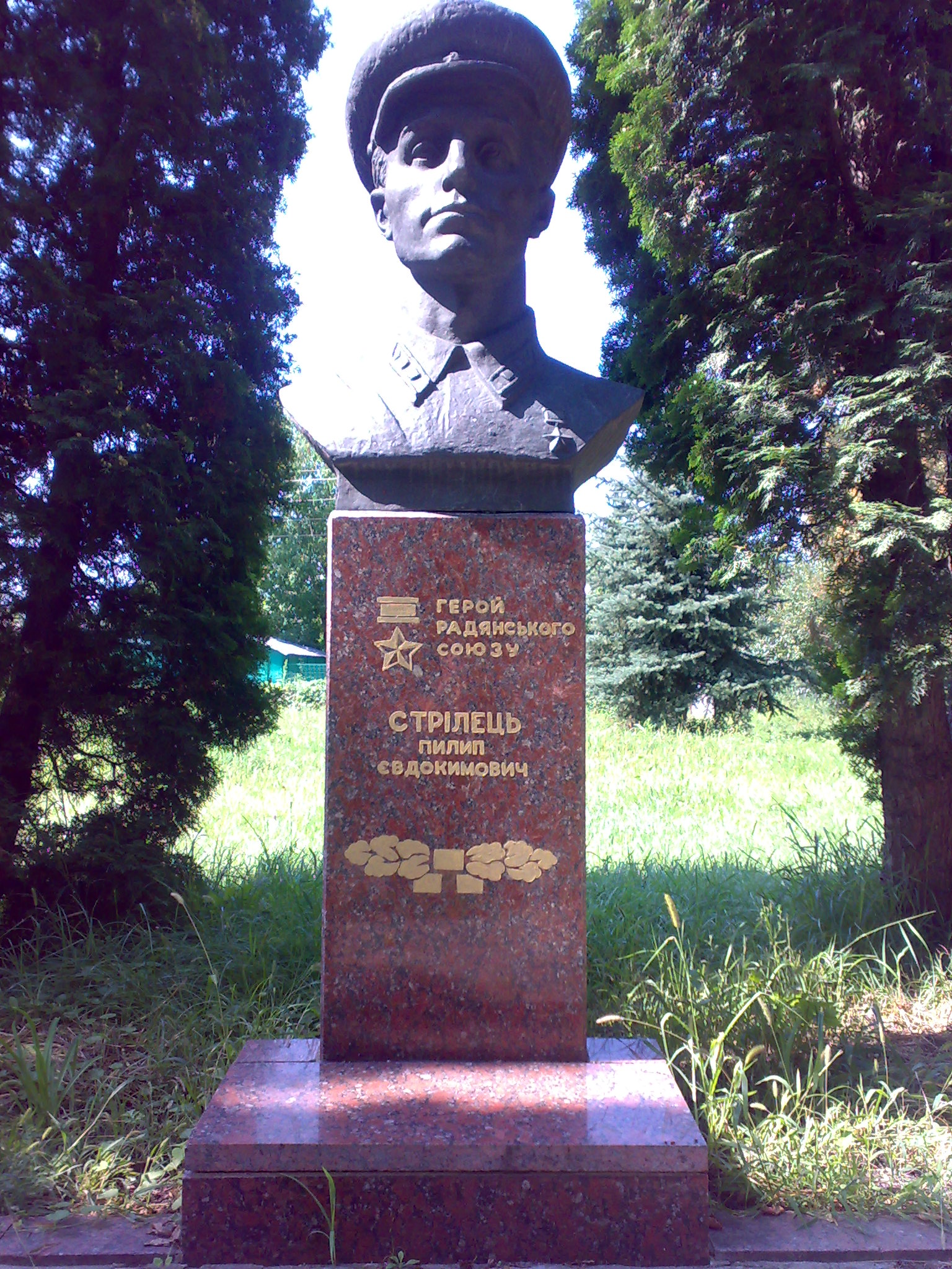 Пам'ятник Стрільцю Пилипу Євдокимовичу в Миронівці